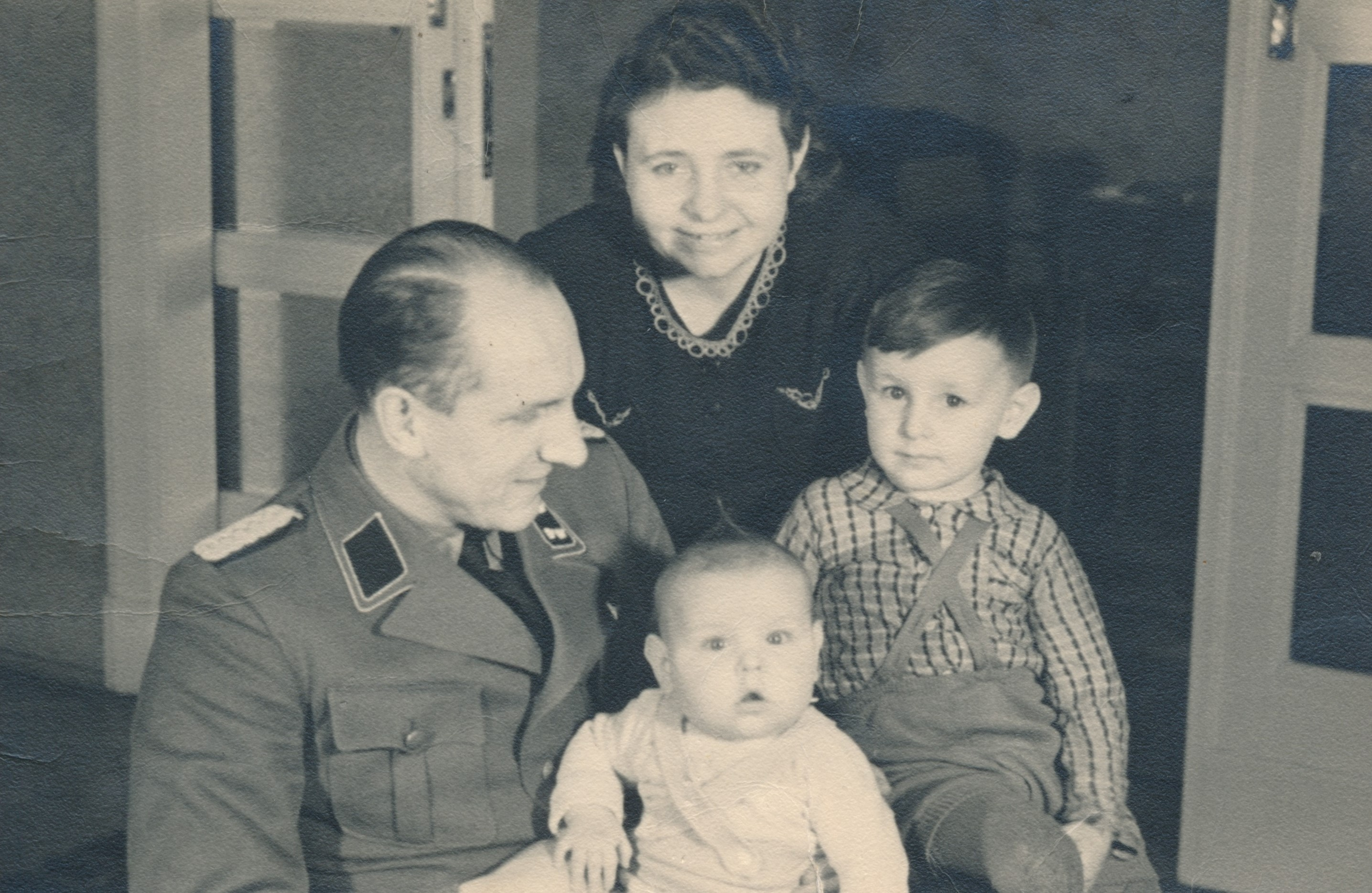 SS-Hauptsturmführer/Kriminalrat Dr. jur. Kurt Riedel im Kreise seiner Familie 1941